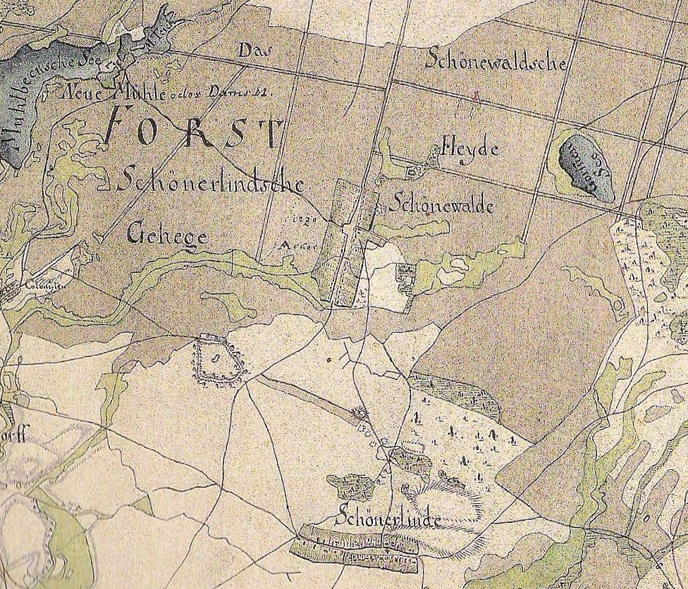 Karte der Umgebung von Schönerlinde und Schönwalde in den Jahren 1767 bis 1787, Land Brandenburg, Deutschland